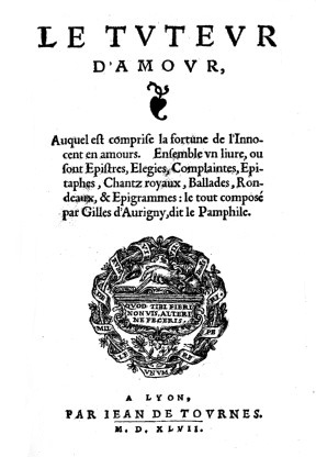 Gilles d'Aurigny. le Tuteur d'amour (1547). Page de titre.